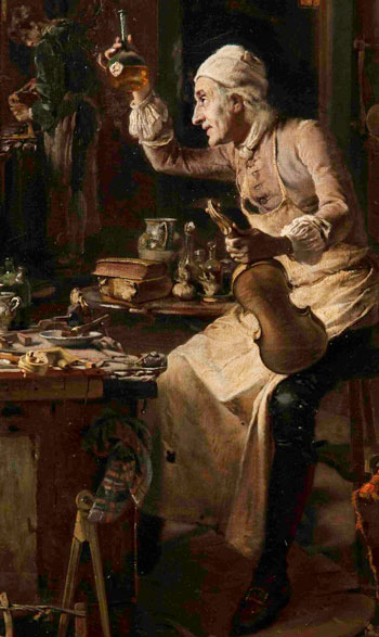 La bottega di Antonio Stradivari, 1886